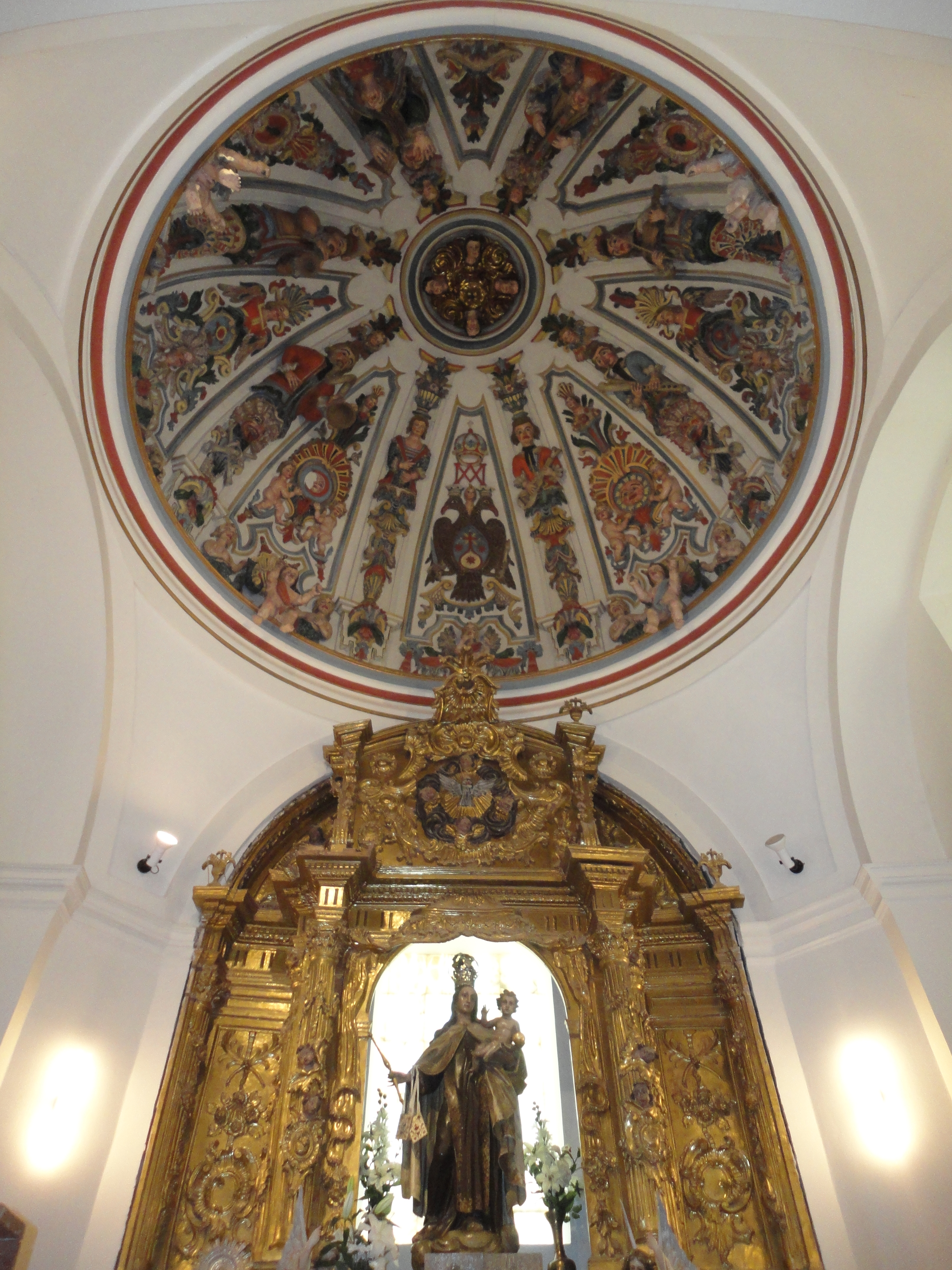 Media naranja con yeserías barrocas de gran peculiaridad en Castilla y León. Retablo rococó con la imagen titular.